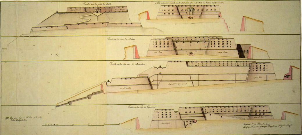 Gruppo in cinque prospetti del Forte S. Vittorio di tortona di Giuseppe Baglione 1799